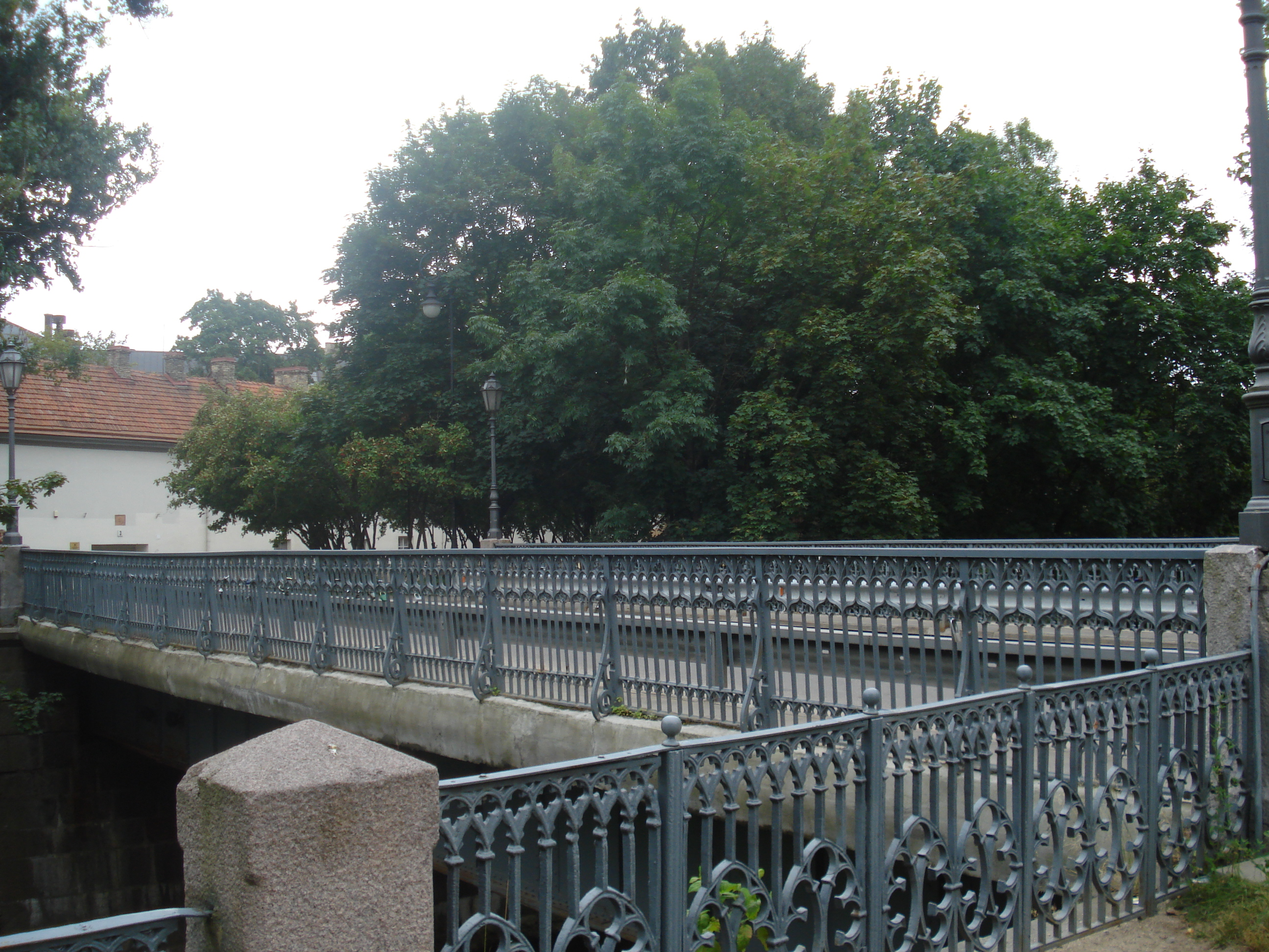 Bernardinu bridge over Vilnia river (Bernardinų tiltas, jungia Maironio g. ir Malūnų g.) in Vilnius